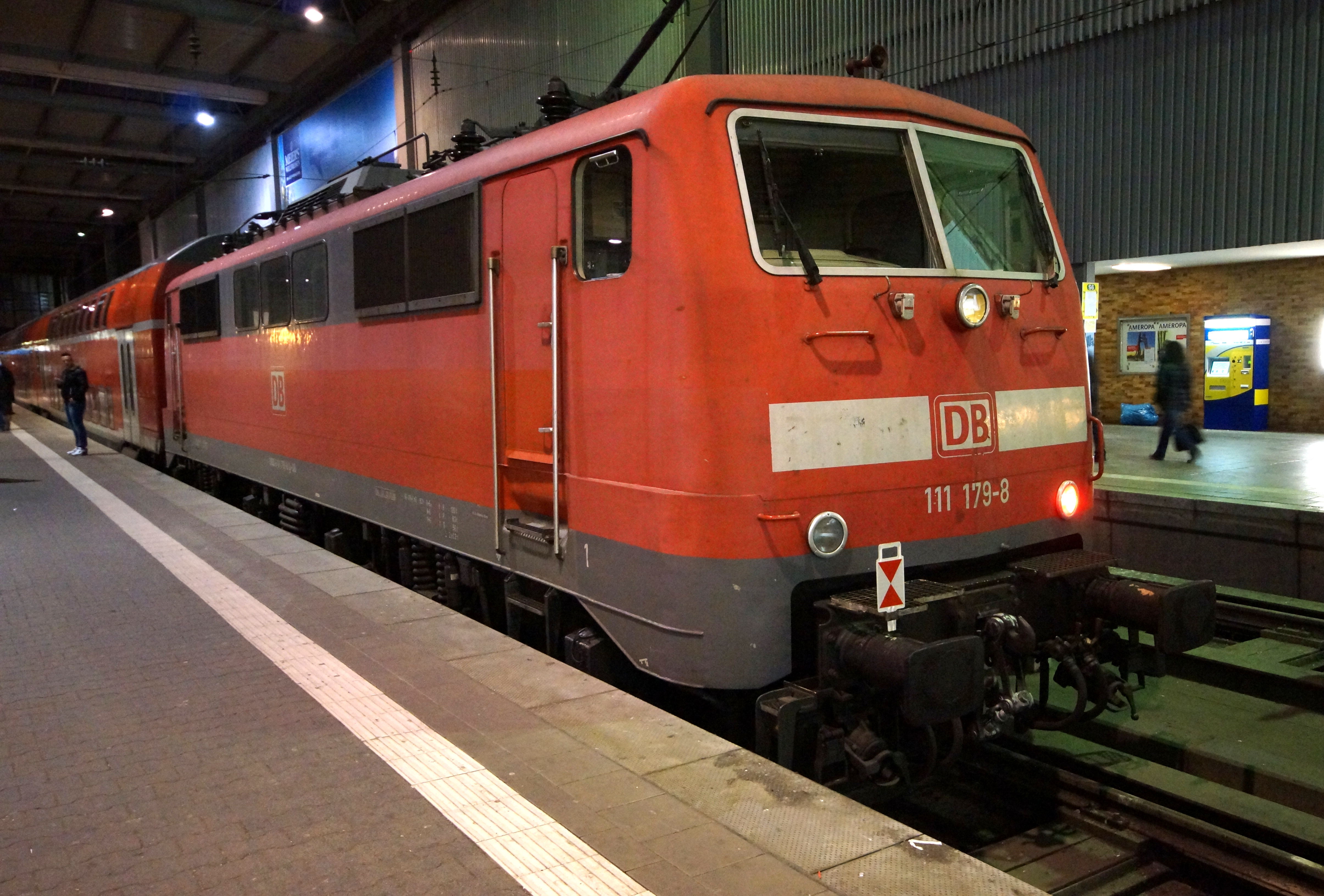 DB-Baureihe 111 als Donau-Isar-Express im Münchener Hauptbahnhof auf dem Weg nach Passau